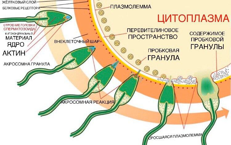 Русская версия этой схемы